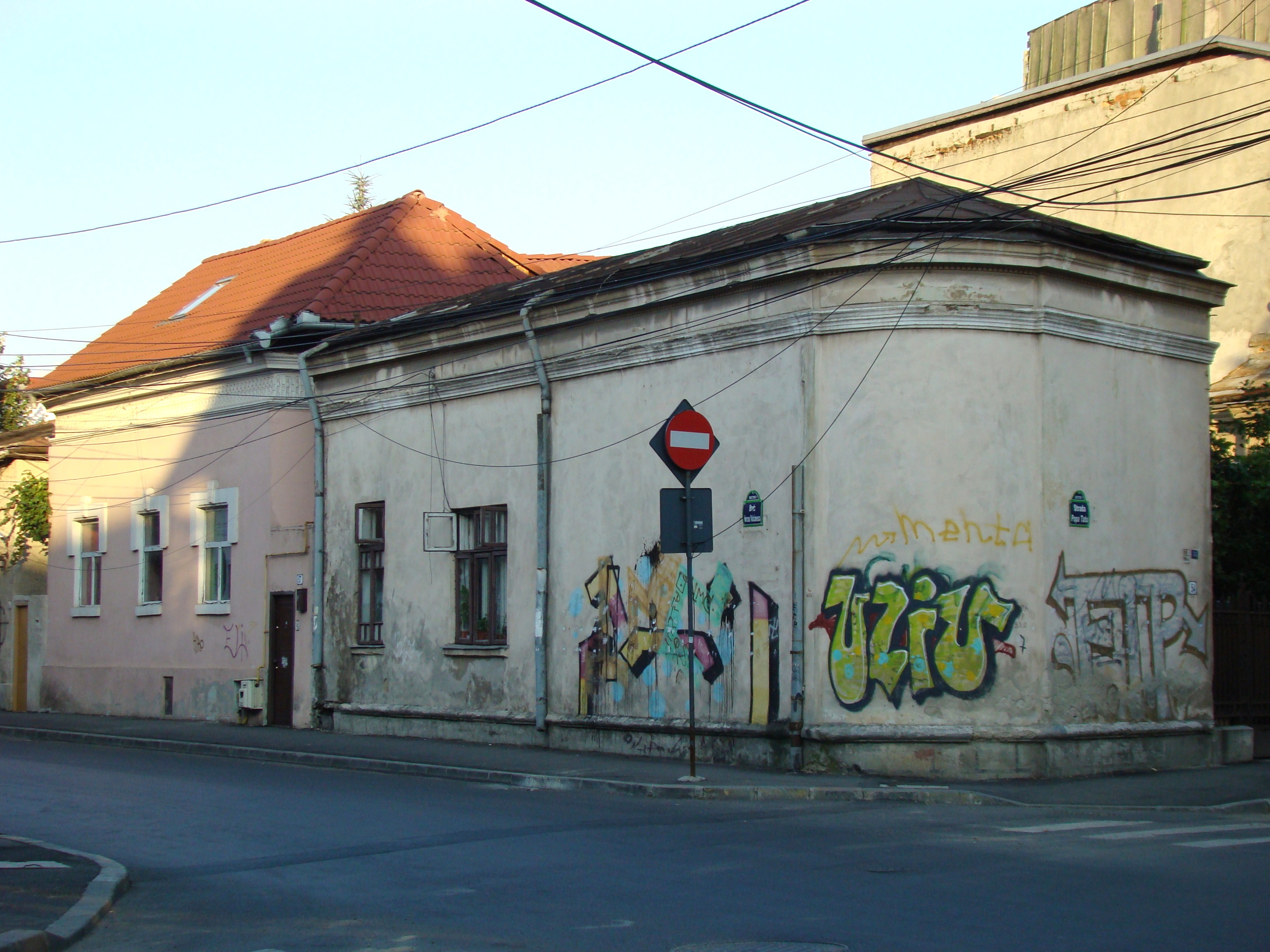 Clădire monument istoric, str. Mircea Vulcănescu, nr.57